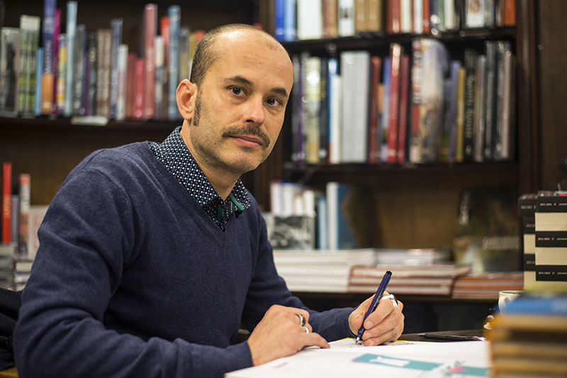 L'auteur de bande dessinée Hervé Tanquerelle en dédicace à Nantes en janvier 2017.